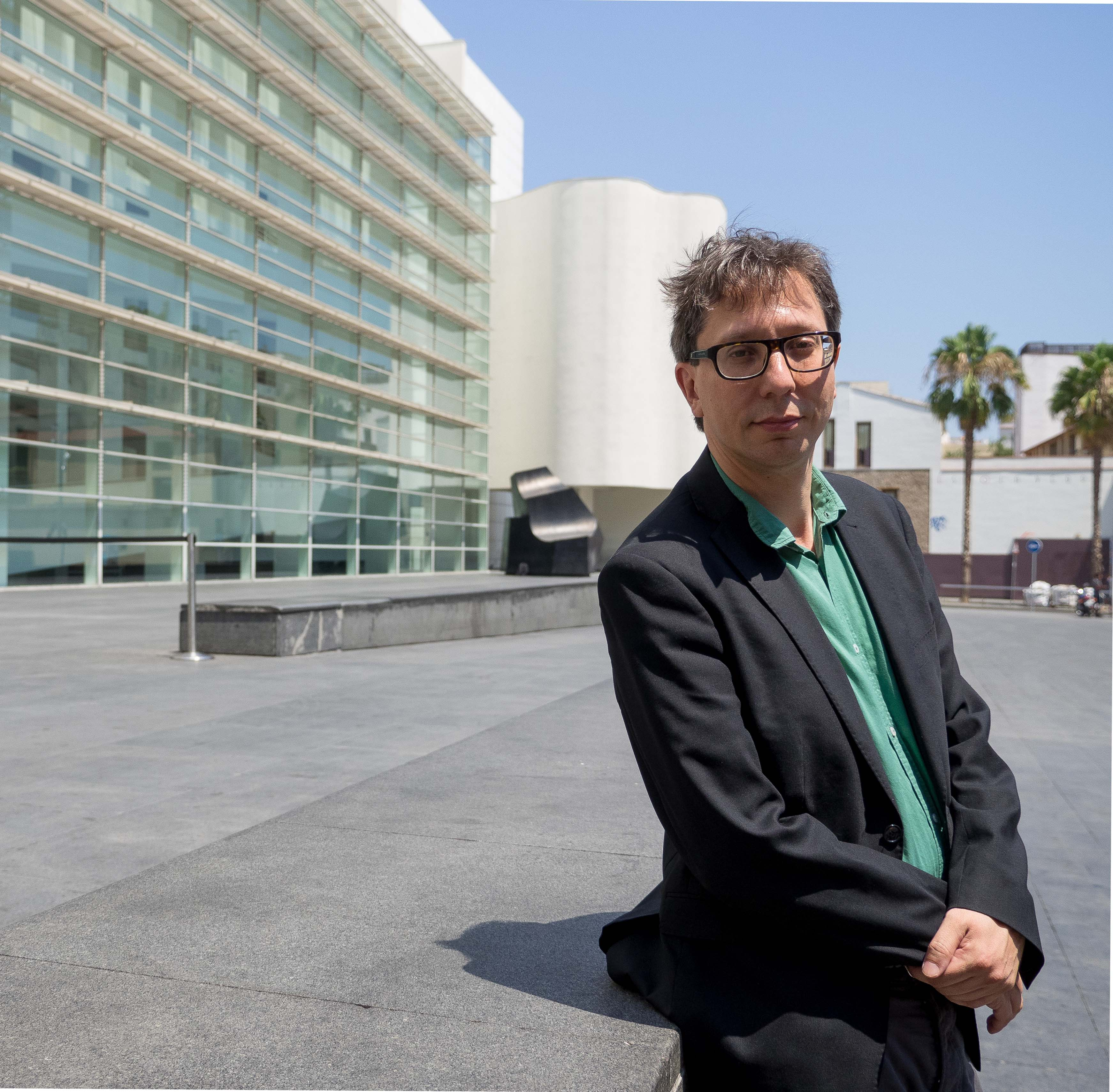 Ferran Barenblit per Miquel Coll